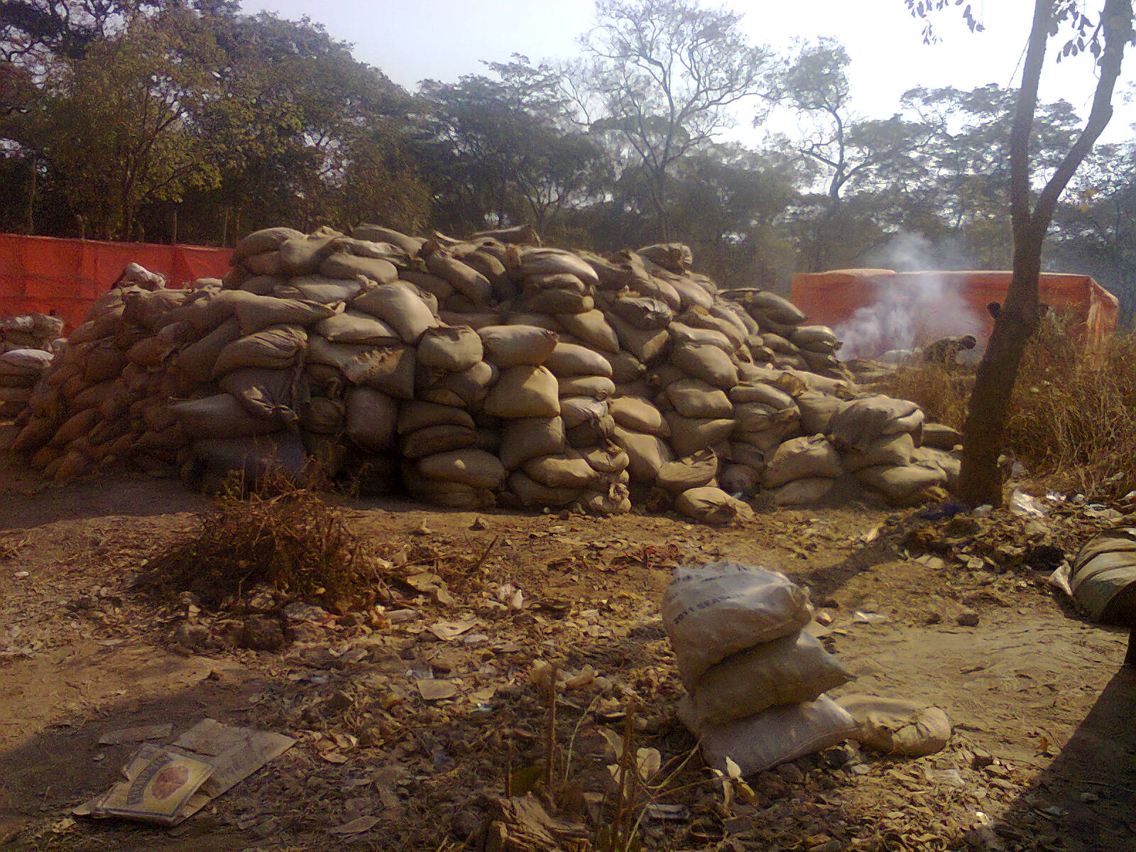 Sac de cuivre de la MMC